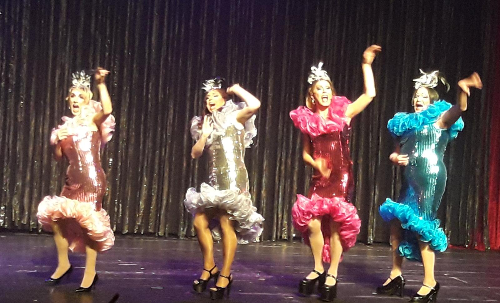 הרכב מלכות הדראג "פאות קדושות" בהופעה בהיכל התיאטרון בקריית מוצקין.